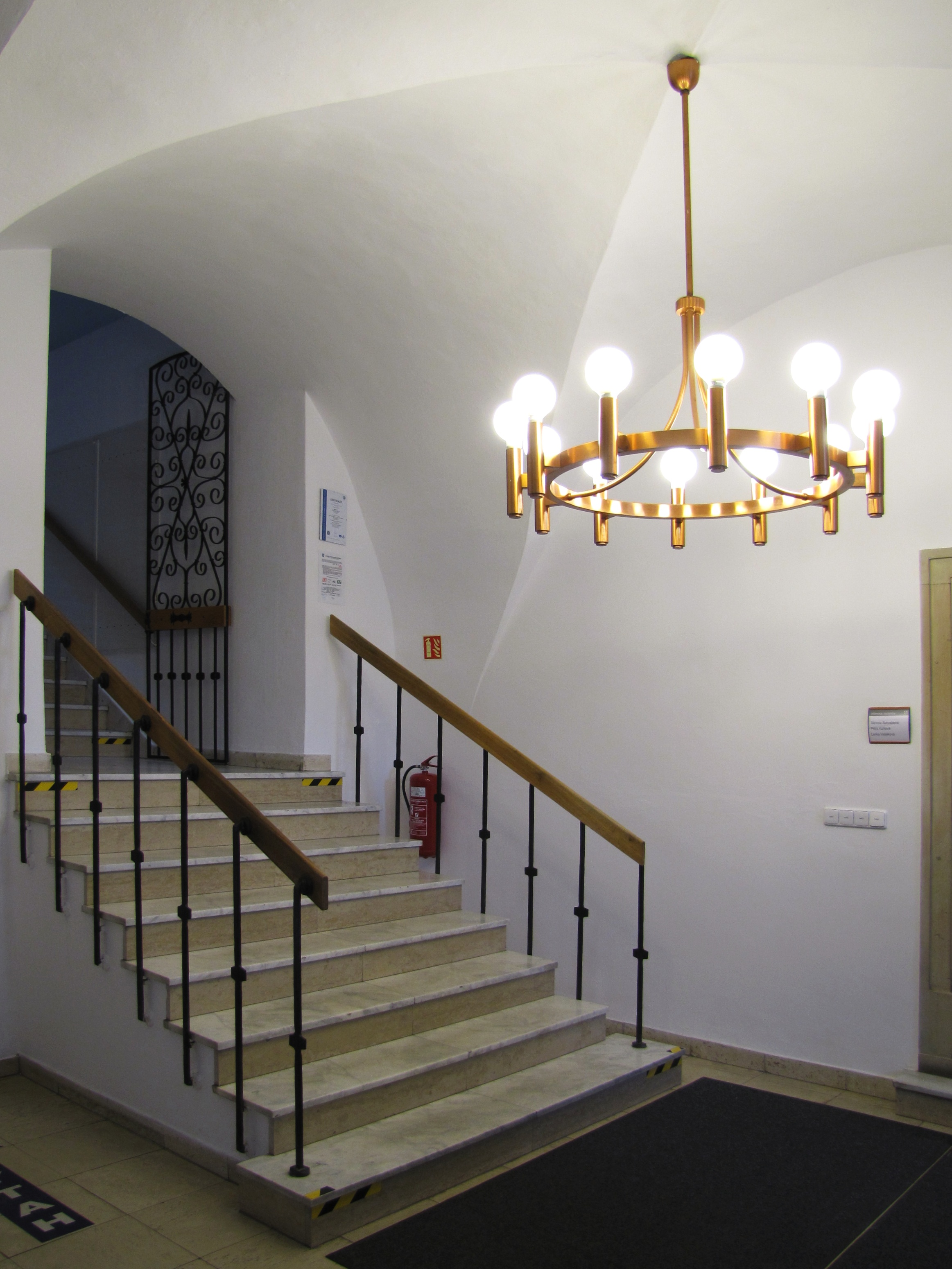 Interier radnice v Kyjově - hlavní schodiště